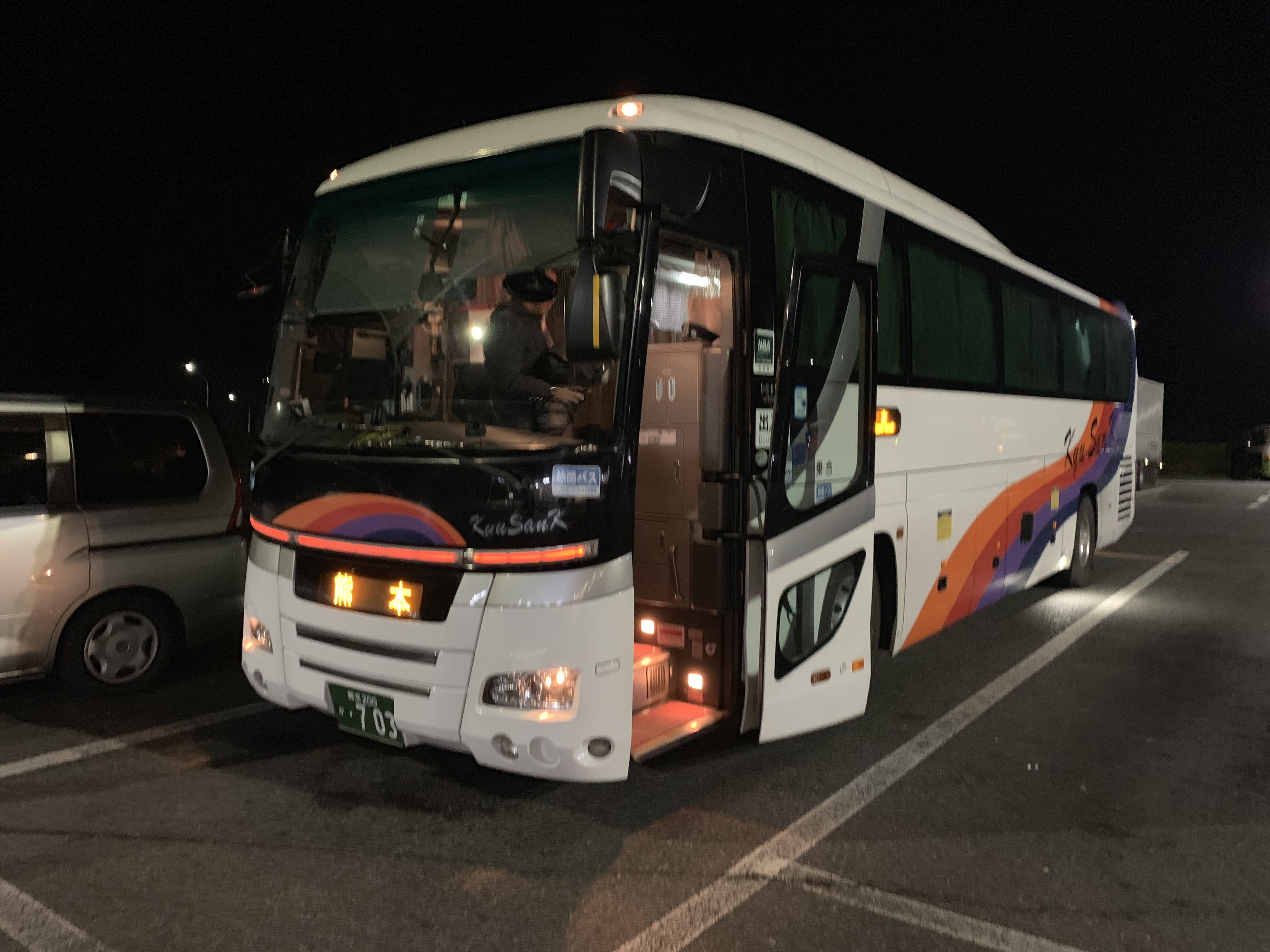 九州産交バス「サンライズ号」専用車、熊本200 か ７０３ 車種：日野セレガジェイバス車体。 福石パーキングエリアにて撮影